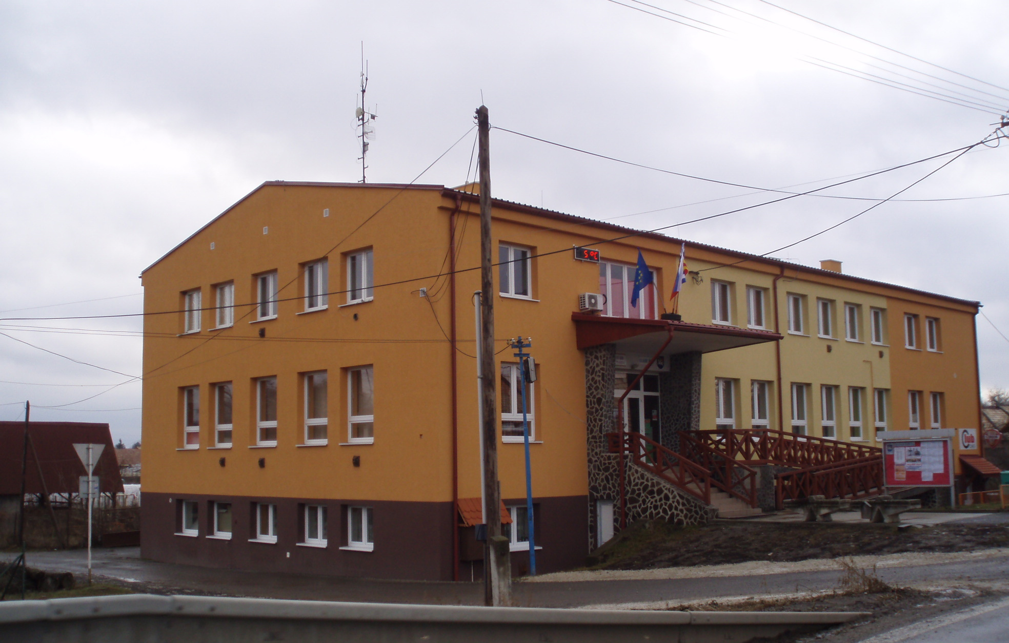 Obecný úrad, Dolné Plachtince